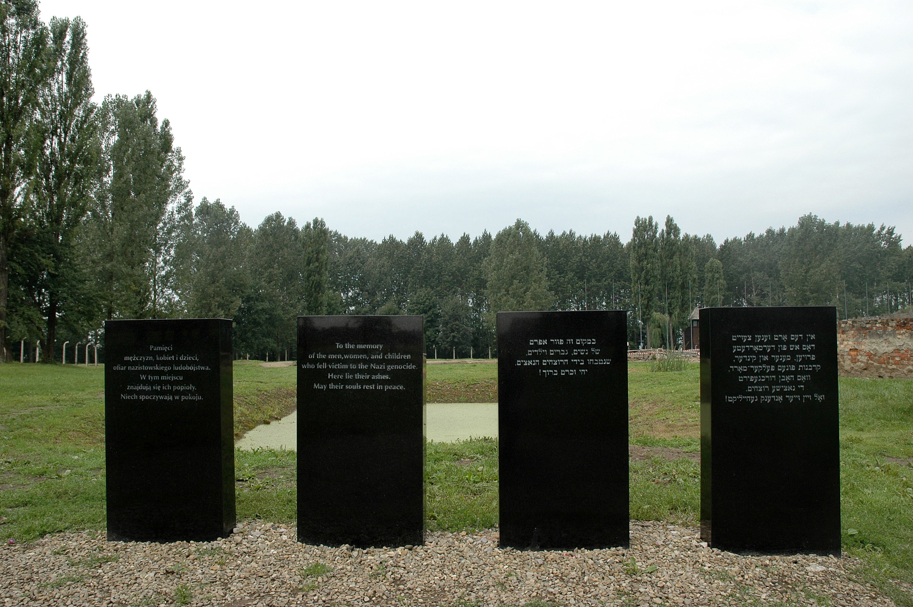 Die Aufnahme zeigt vier Gedenksteine im Vernichtungslager Auschwitz Birkenau. Text auf den Steinen: "Zur Erinnerung an die Männer, Frauen und Kinder, die Opfer des Nazi-Genozids wurden. Hier ruht ihre Asche. Mögen ihre Seelen in Frieden ruhen."